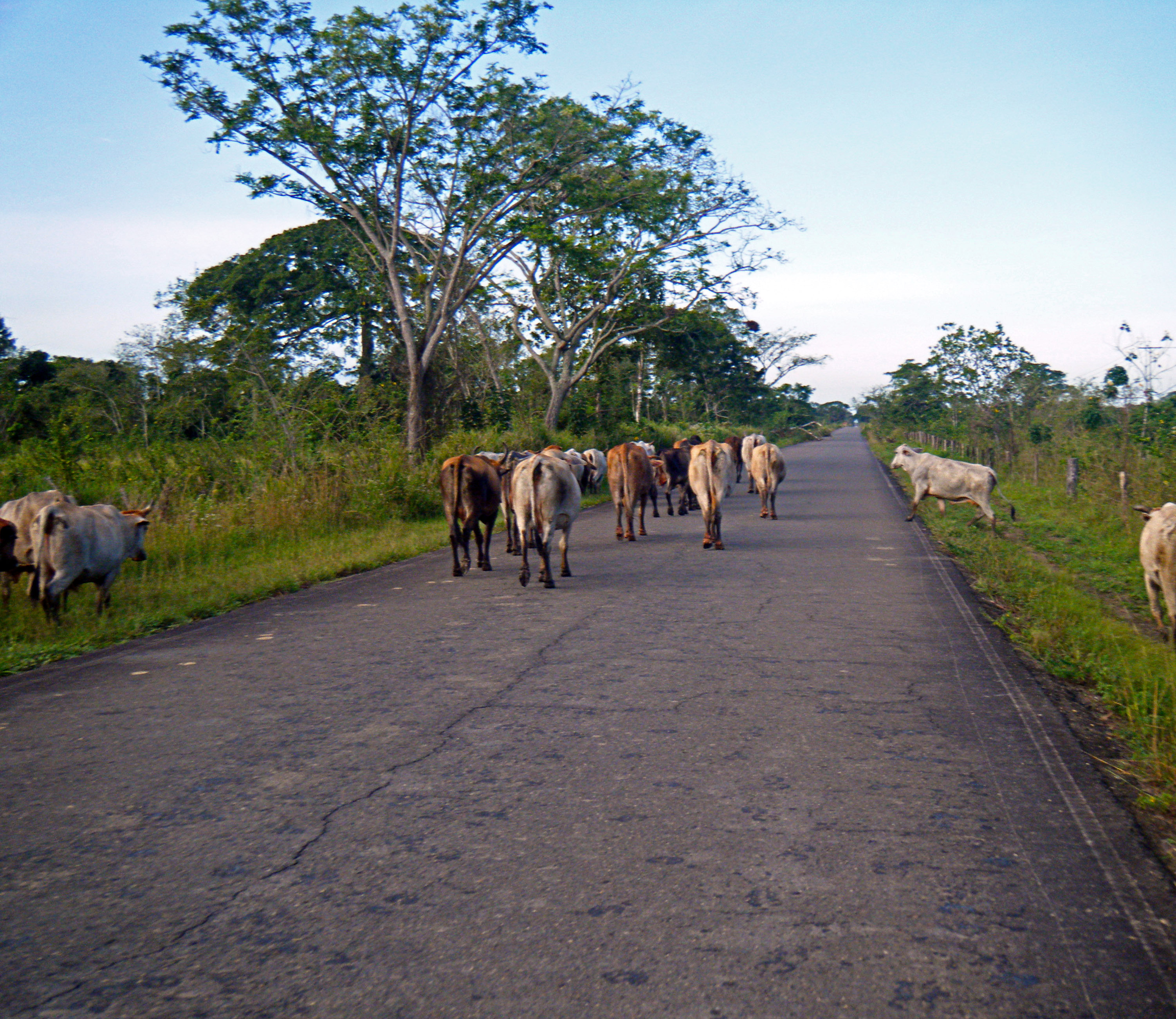 En la carretera entre San José de Buja y Maturín